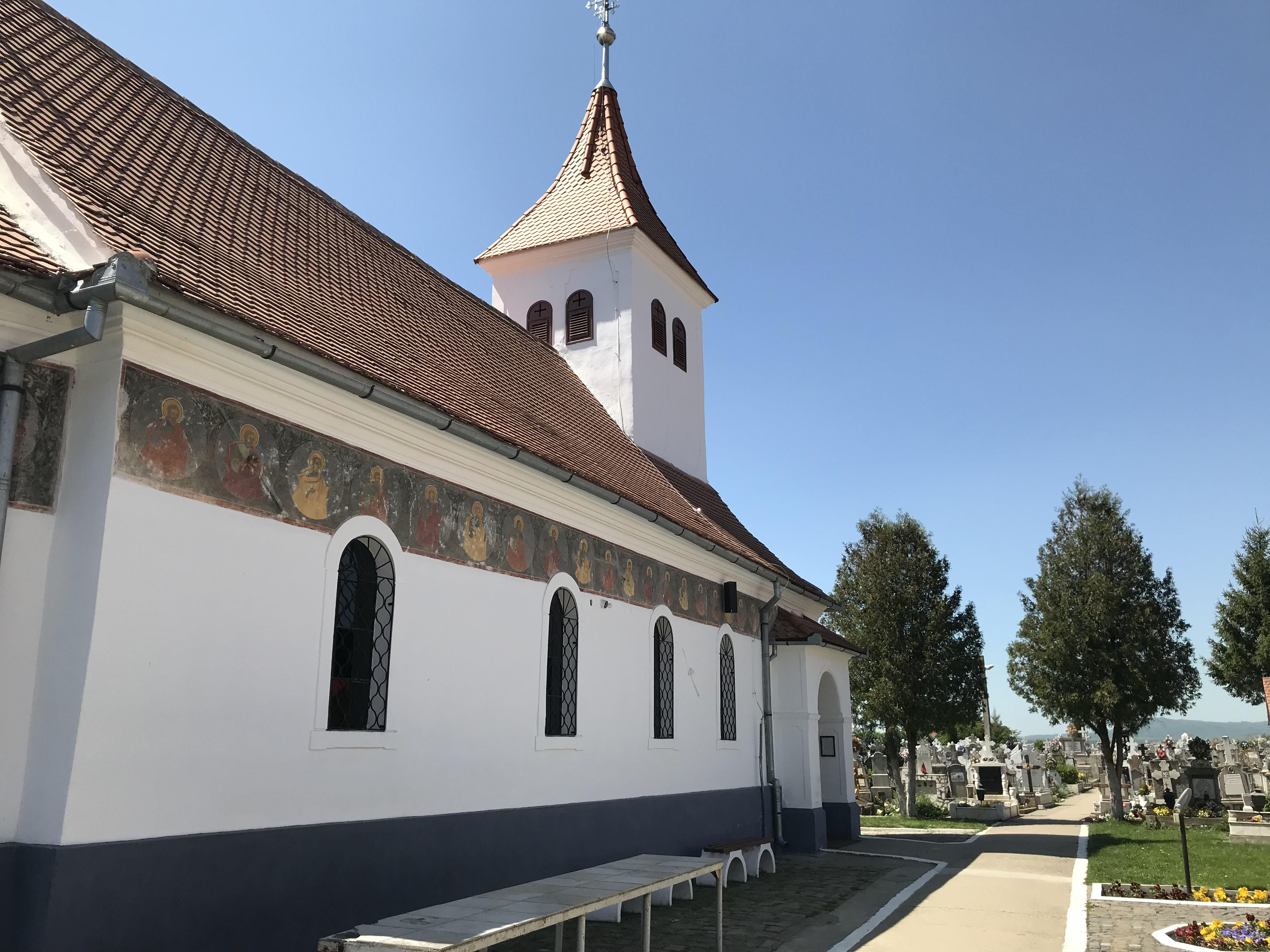 Ansamblul bisericii „Sf. Arhangheli”, sat Hălchiu, județul Brașov